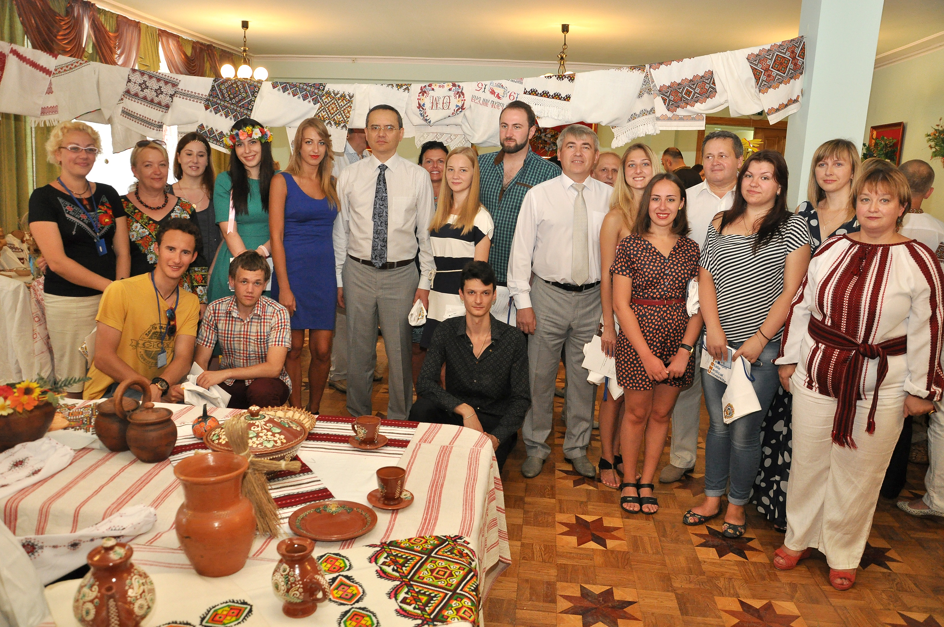 X Літні міжнародні студентські школи в НОК «Червона калина» Тернопільського державного медичного університету імені І. Я. Горбачевського.